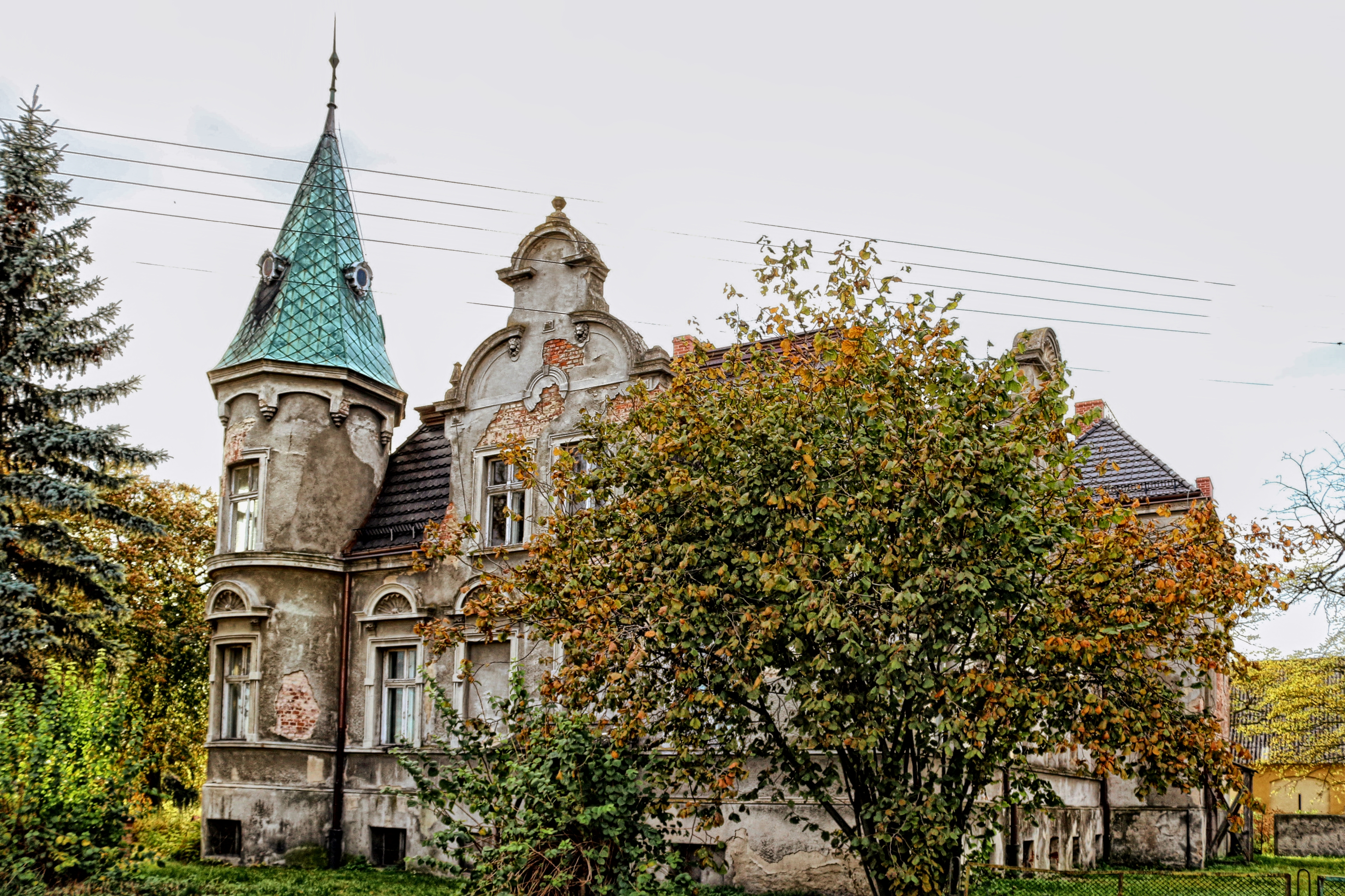 Przyczyna Górna, pałac (nr 67), 4 ćw. XIX